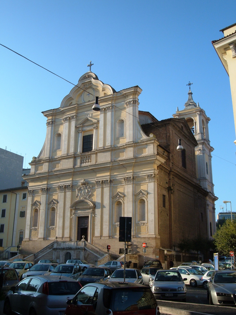 Chiesa di Santa Maria delle Grazie alle Fornaci, a Roma, nel quartiere Aurelio.